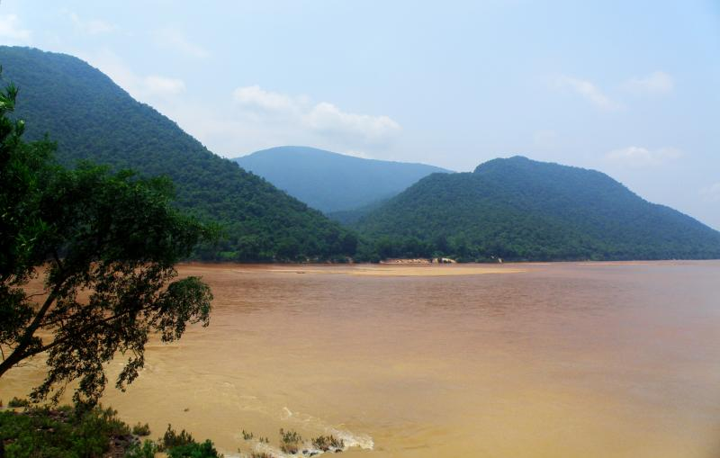 Satkosia Sanctuary, Tikarpada, Orissa.